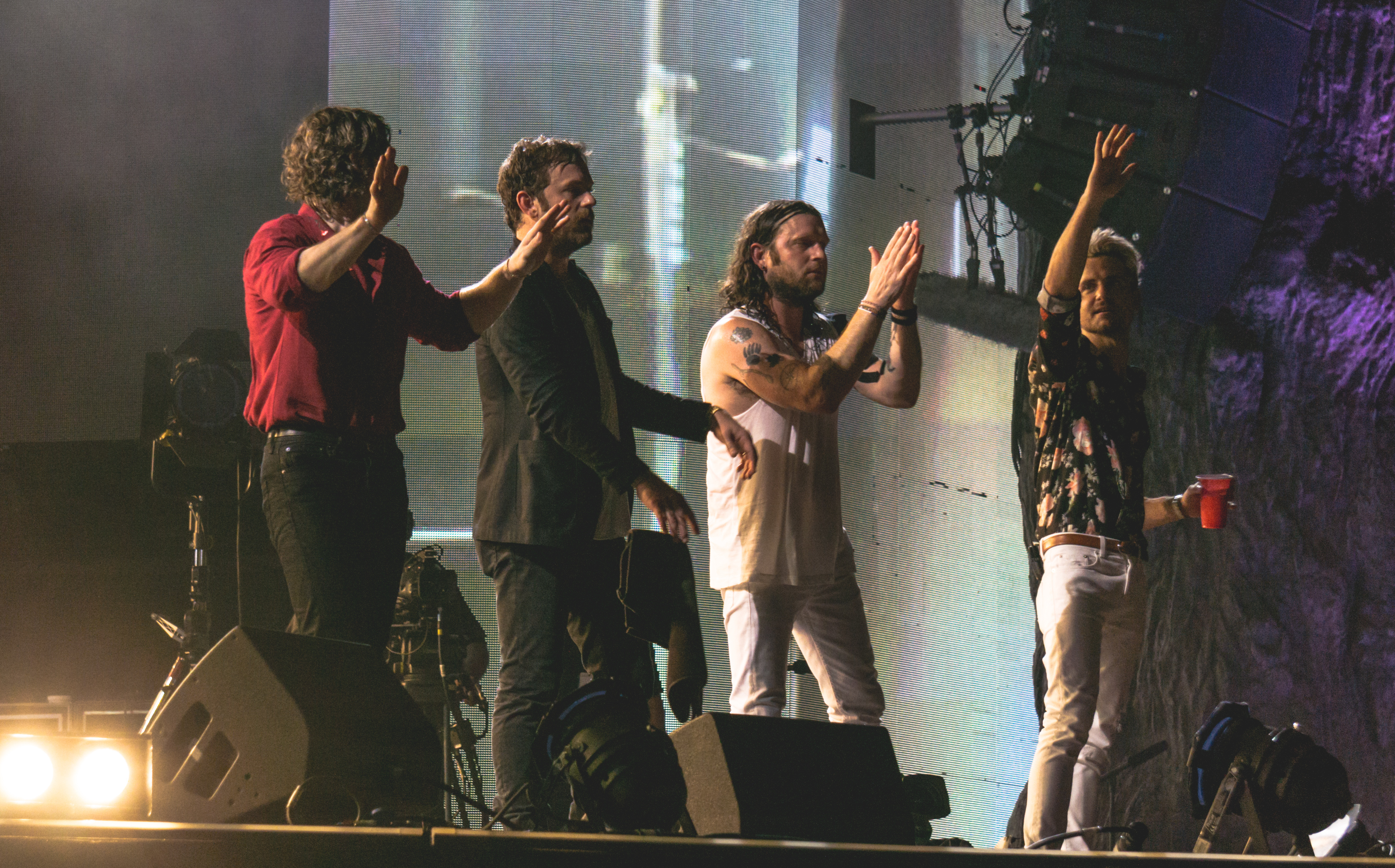 KoLHydePark060717-36